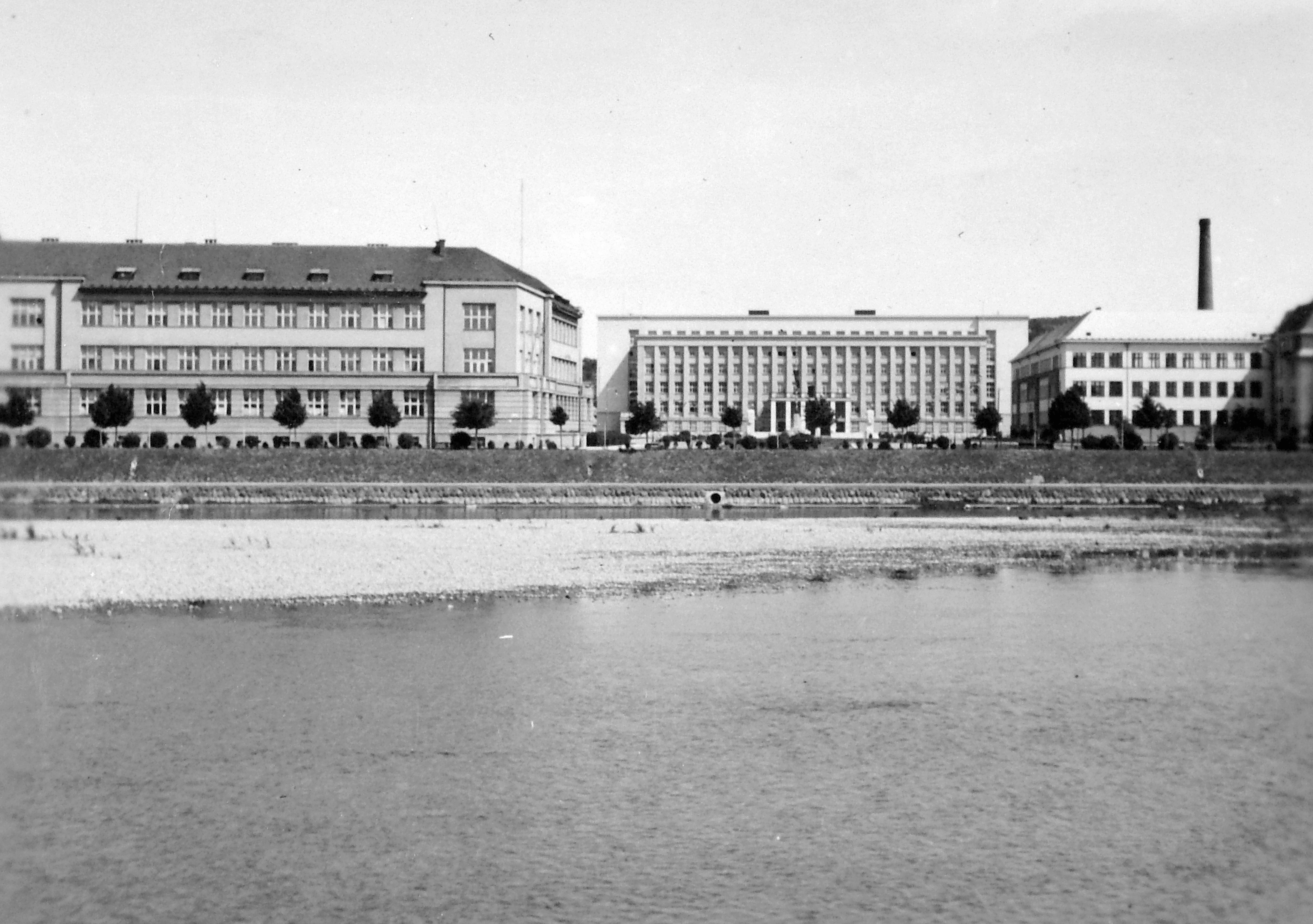 jobbra a volt királyi törvényszék ügyészség és járásbíróság épülete, balra a volt csendőrparancsnokság, középen a volt parlament. Location: Ukraine, Uzhgorod Tags: shore, public building, factory chimney, river, Transcarpathia Title: jobbra a volt királyi törvényszék ügyészség és járásbíróság épülete, balra a volt csendőrparancsnokság, középen a volt parlament.